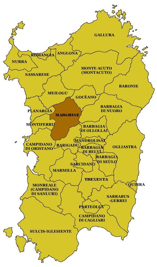 Sardinian Subregions